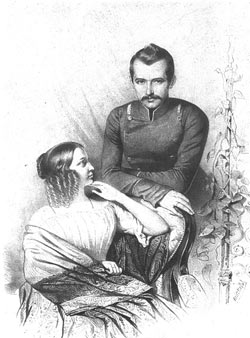 Русский генерал Вревский, Павел Александрович (1809—1855) и его первая супруга Мария Сергеевна Ланская (1819—1845).